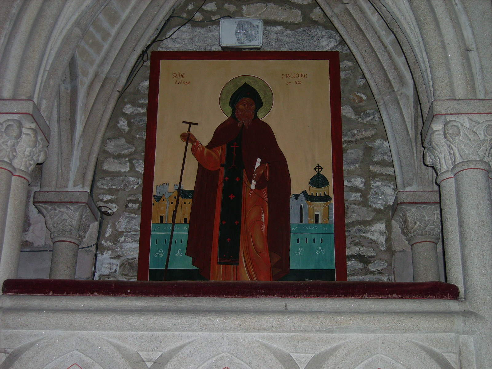 Ikono de sankta Magloire en la preĝejo de Léhon